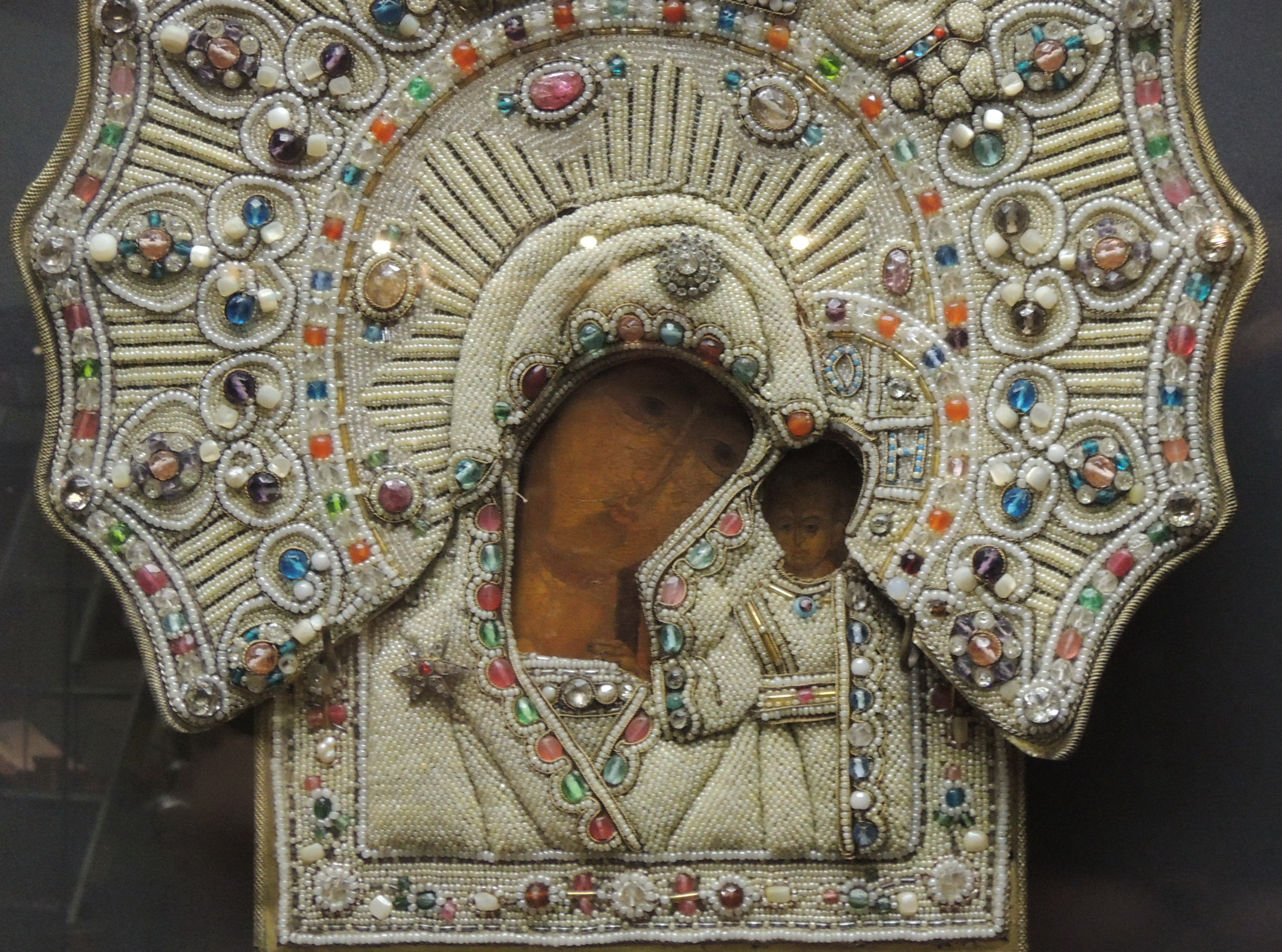 Икона "Богоматерь Казанская". 16-17 вв., оклад - 1881 год. Ярославский музей-заповедник.